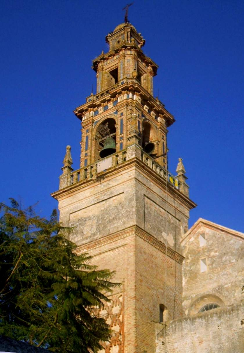 Iglesia de Santiago (Carmona; Sevilla)